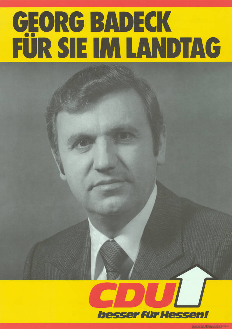 Georg Badeck Für Sie im Landtag CDU Besser für Hessen Abbildung: Porträtfoto Plakatart: Kandidaten-/Personenplakat mit Porträt Auftraggeber: Verantw.: CDU-Landesverband Hessen, Wiesbaden Objekt-Signatur: 10-007 : 503 Bestand: Landtagswahlplakate Hessen (10-007) GliederungBestand10-18: Landtagswahlplakate Hessen (10-007) » CDU Lizenz: KAS/ACDP 10-007 : 503 CC-BY-SA 3.0 DE